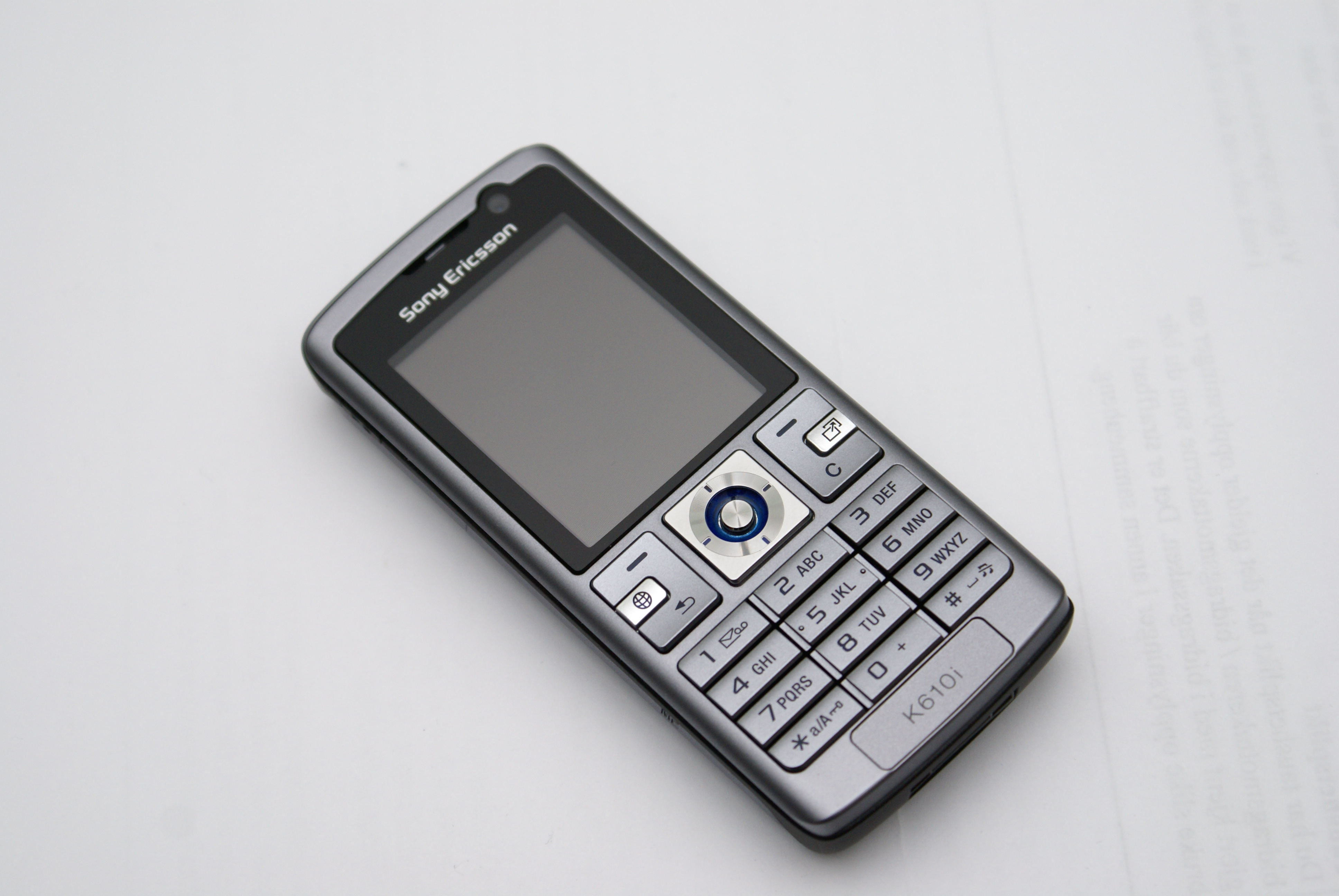 Sony Ericcson k610i